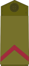 Serbian military ranks and insignia